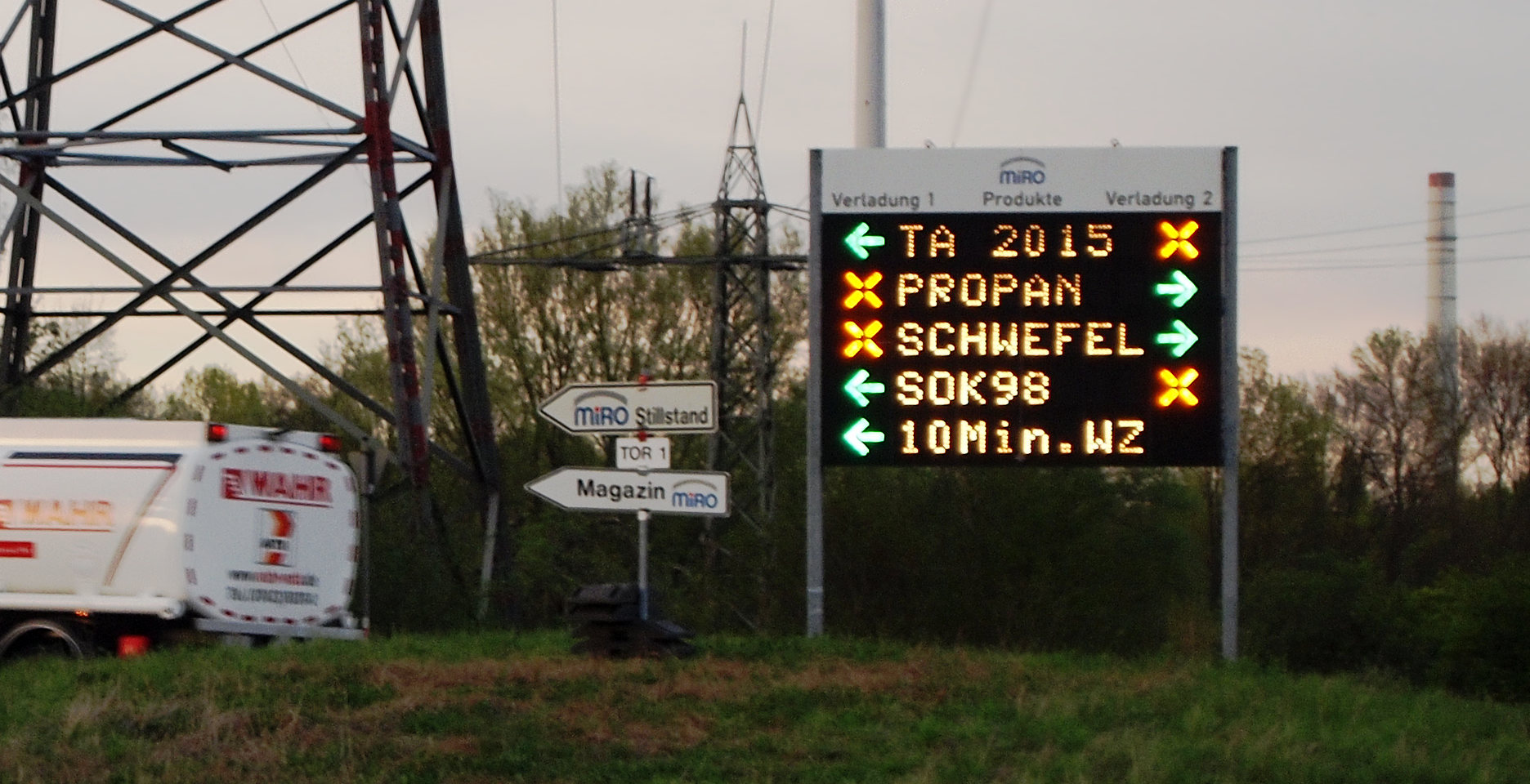 Dynamische Wegweiser an der Zufahrt zur Mineralölraffinerie Oberrhein